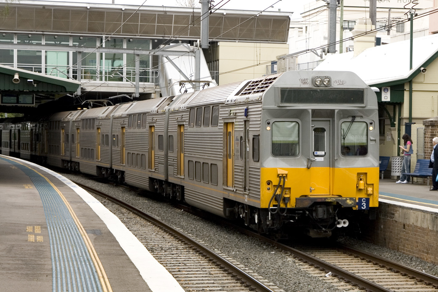 Campsie station